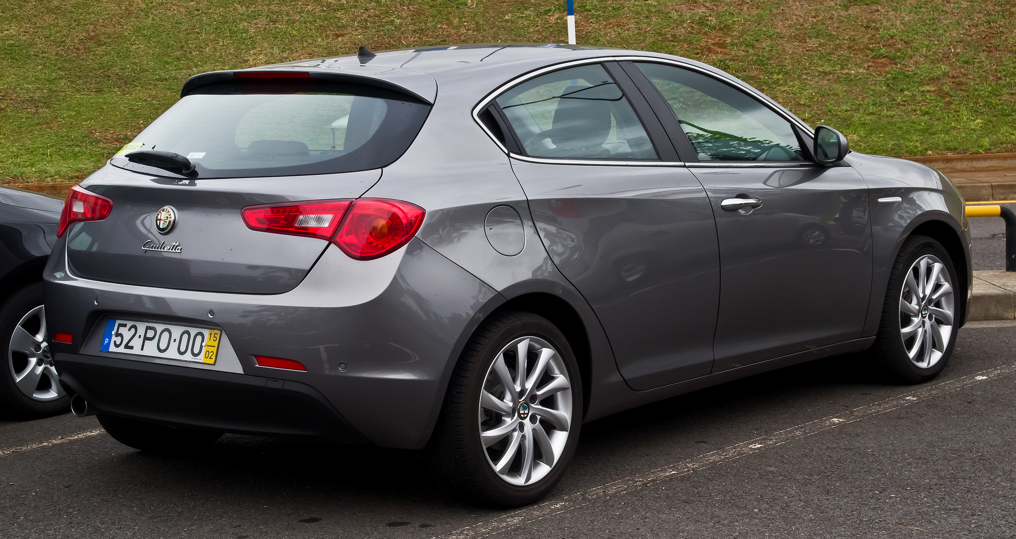 Alfa Romeo Giulietta (940, Facelift)